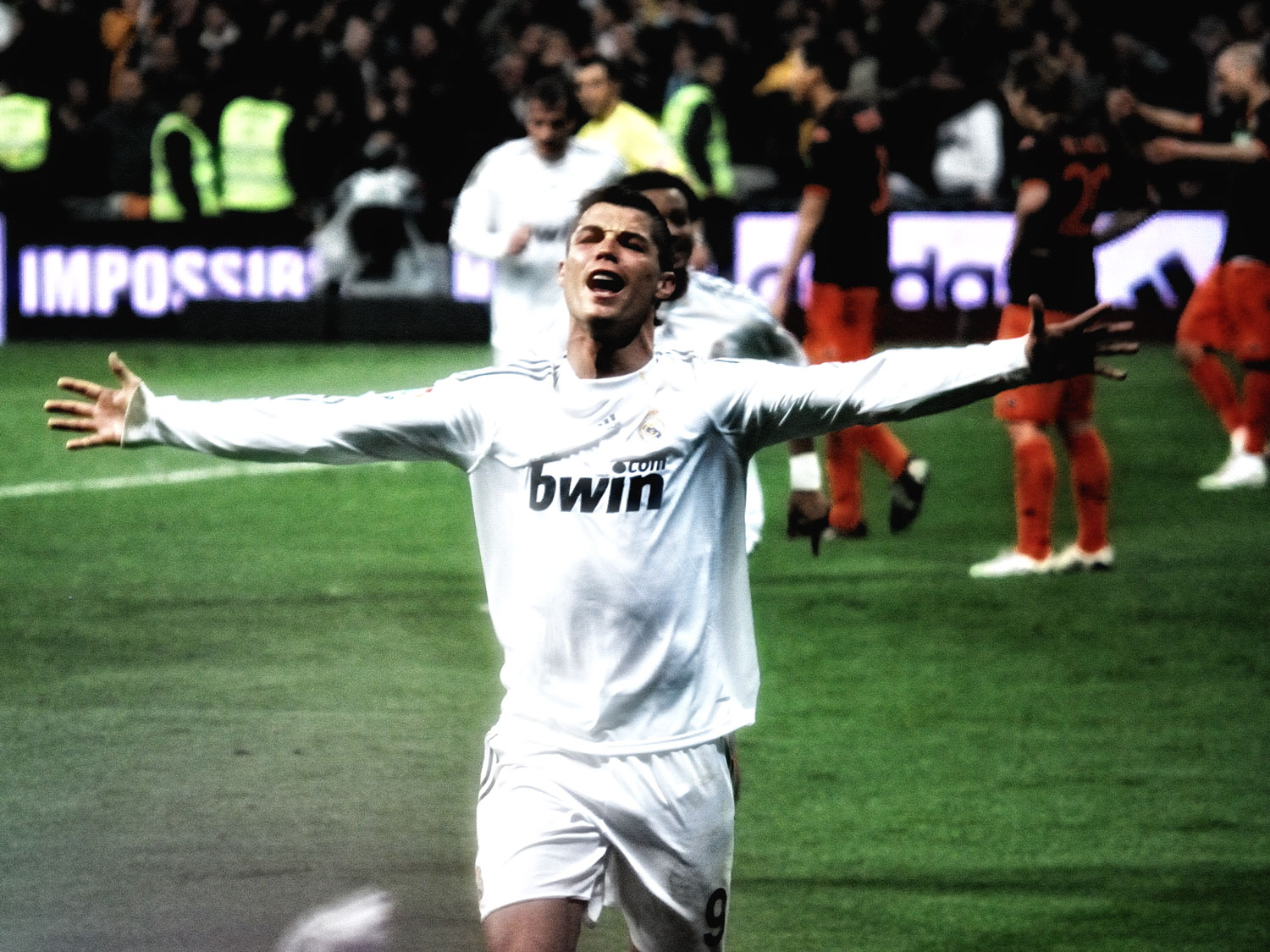 Cristiano Ronaldo tras el gol